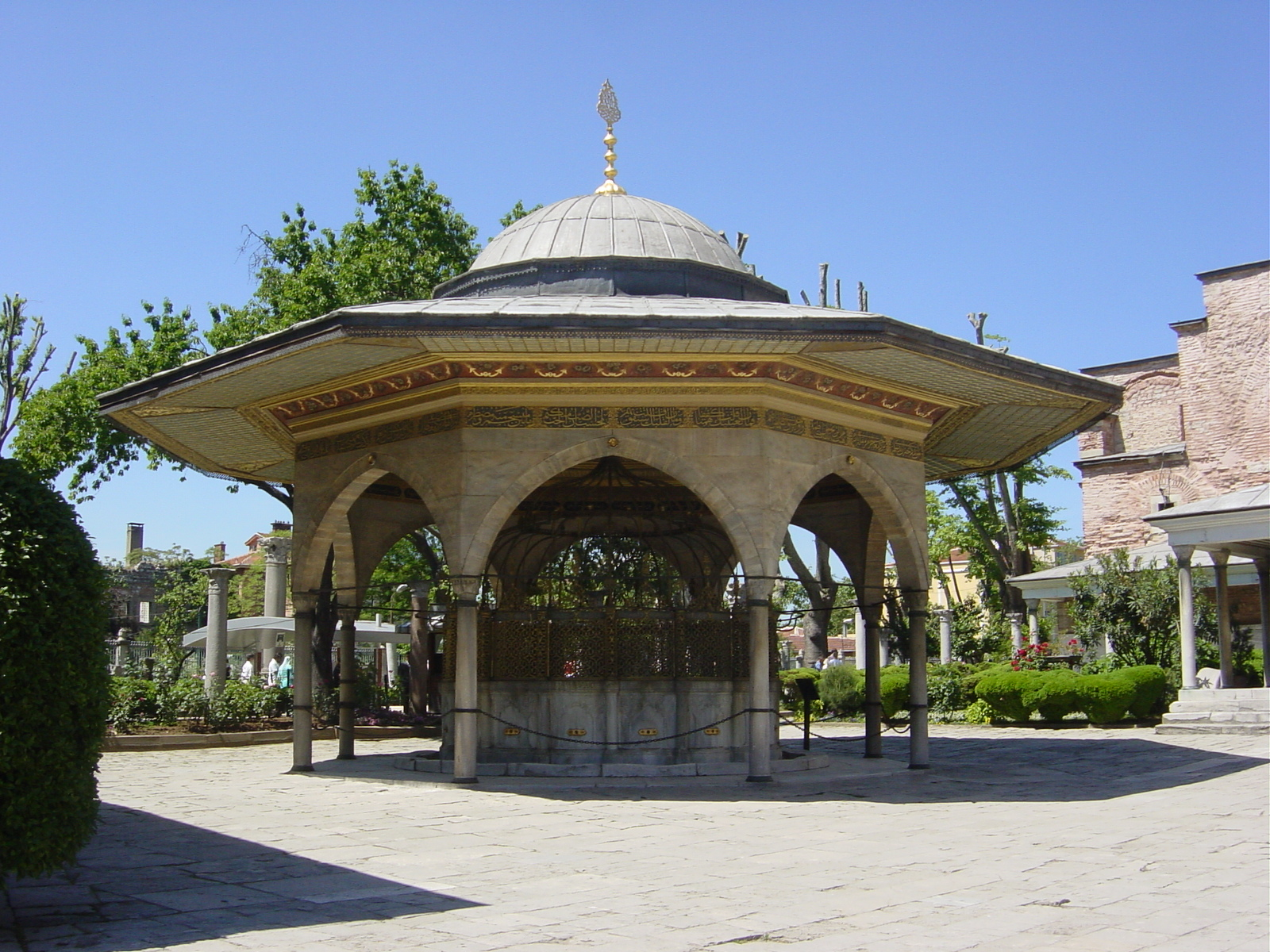 La fontana per abluzioni (Şadirvan) costruita dal sultano turco Mehmed I (Maometto I) (1730-1754) nel 1740 presso la allora moschea di Santa Sofia, ad Istanbul. Foto di: Giovanni Dall'Orto, 25-5-2006.